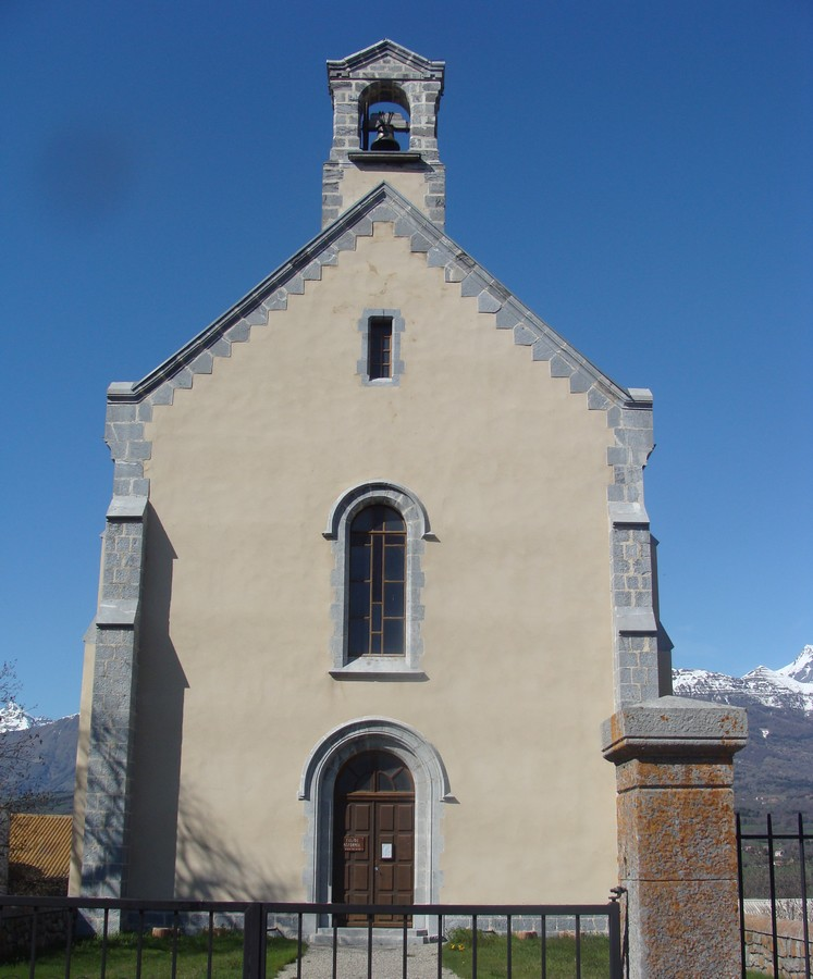 Le temple de Saint-Laurent-du-Cros (Hautes-Alpes).